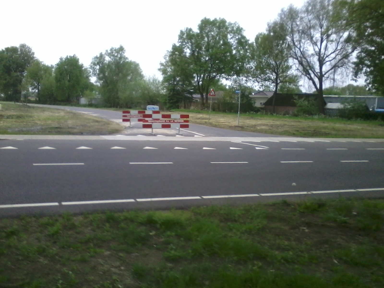 Het vernieuwde gedeelte van de N604 met oprit naar het nieuwe bedrijventerrein Neerakker